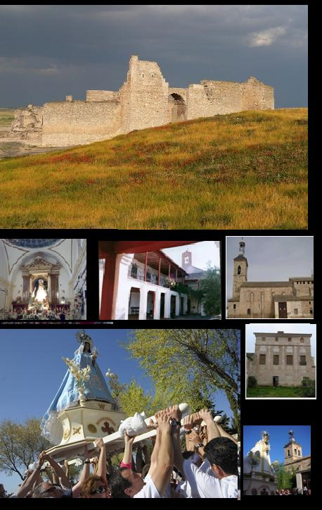 Viva!